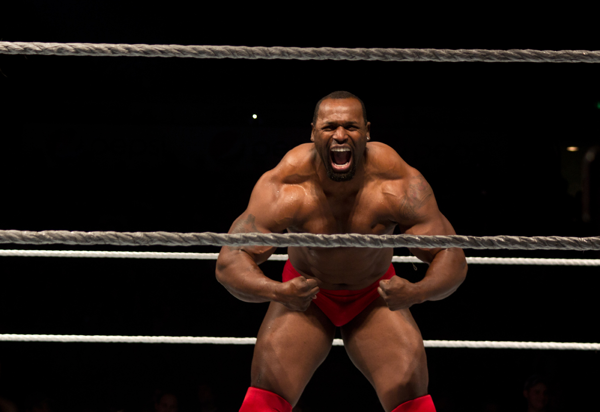 Ezekiel Jackson